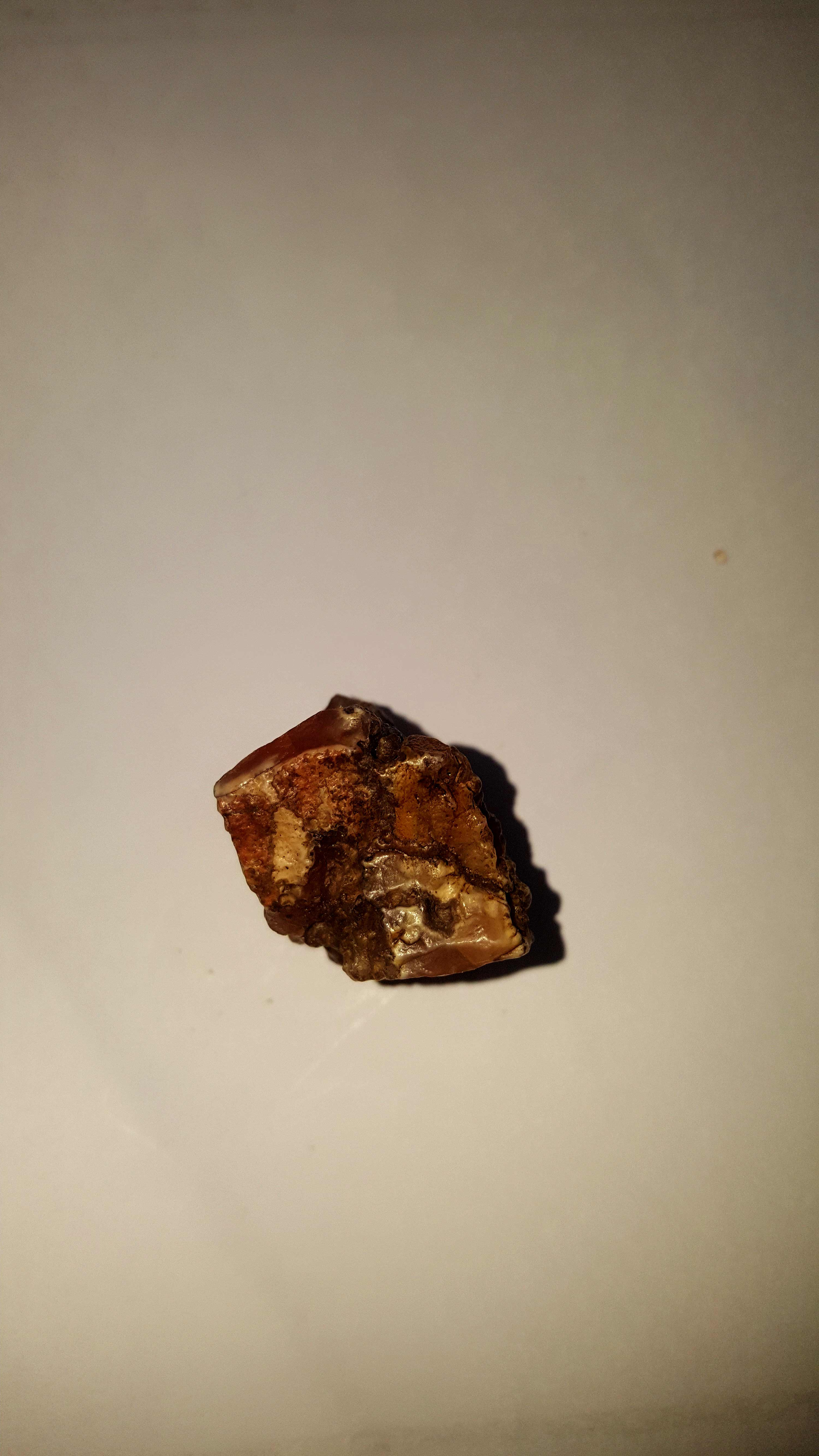 ياقوت